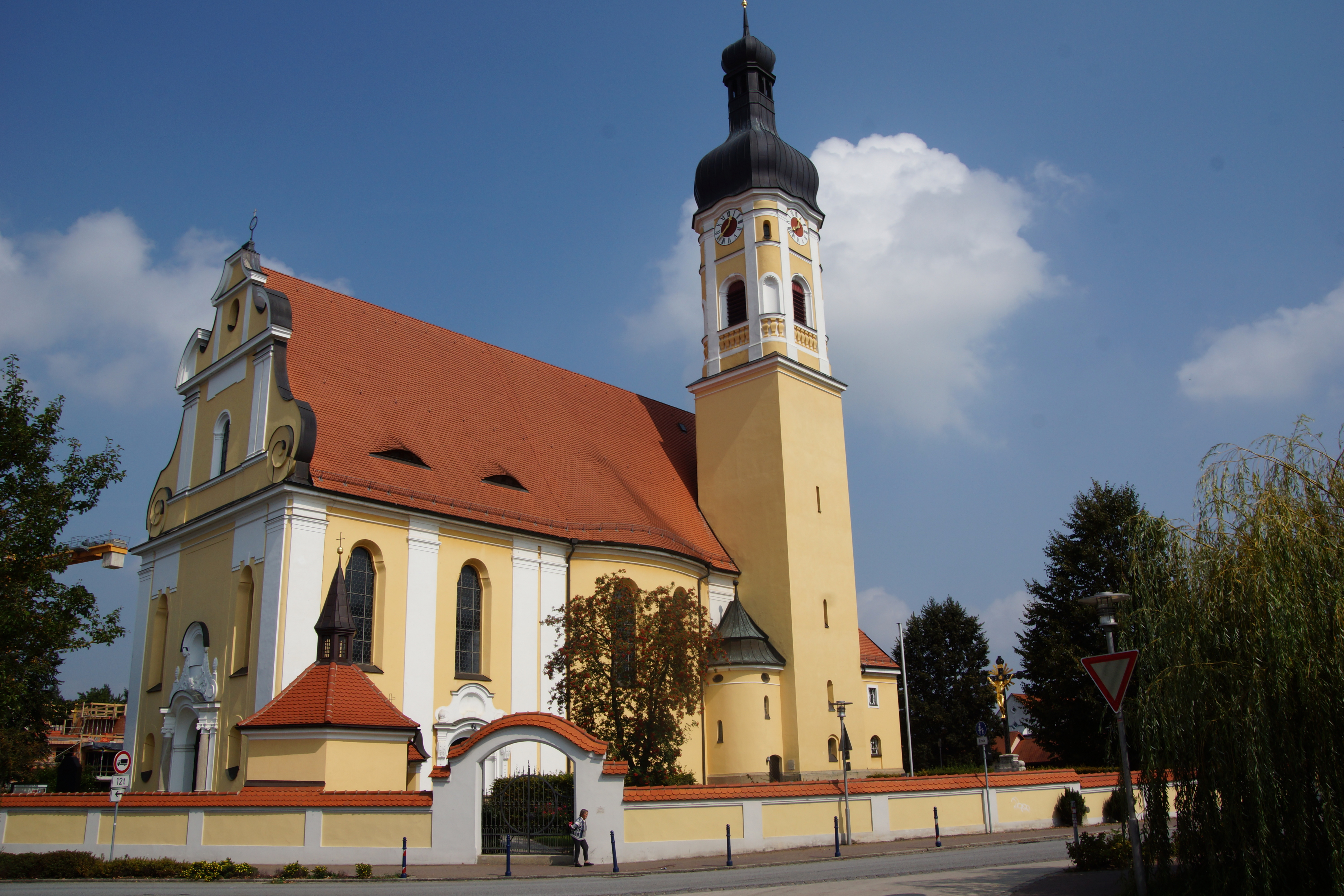 Die katholische Pfarrkirche St. Georg in Obertraubling bei Regensburg